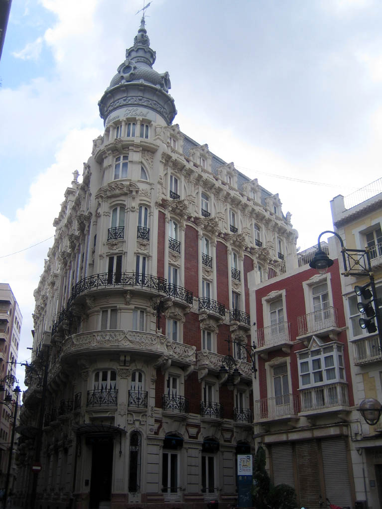 Gran Hotel de Cartagena, obra del arquitecto modernista Víctor Beltrí.